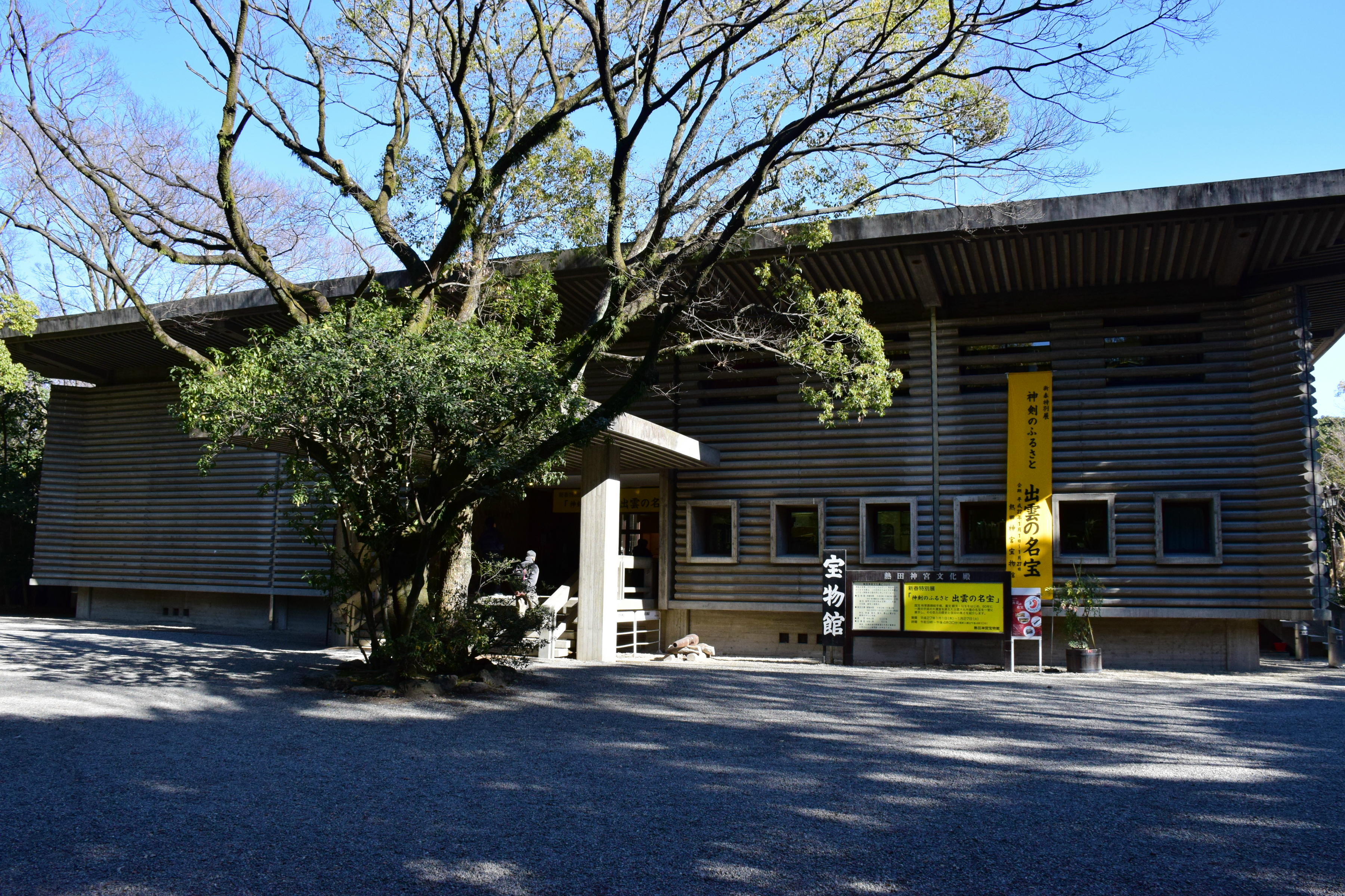 熱田神宮宝物館